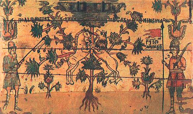 Древо жизни (мировое дерево?), лев, единорог и символическая стража сундука. Северная Двина. Район Борка. 1688 год